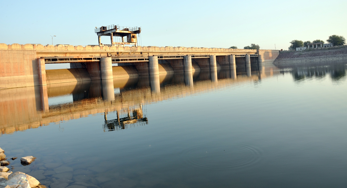 पांचना बांध करौली जिला